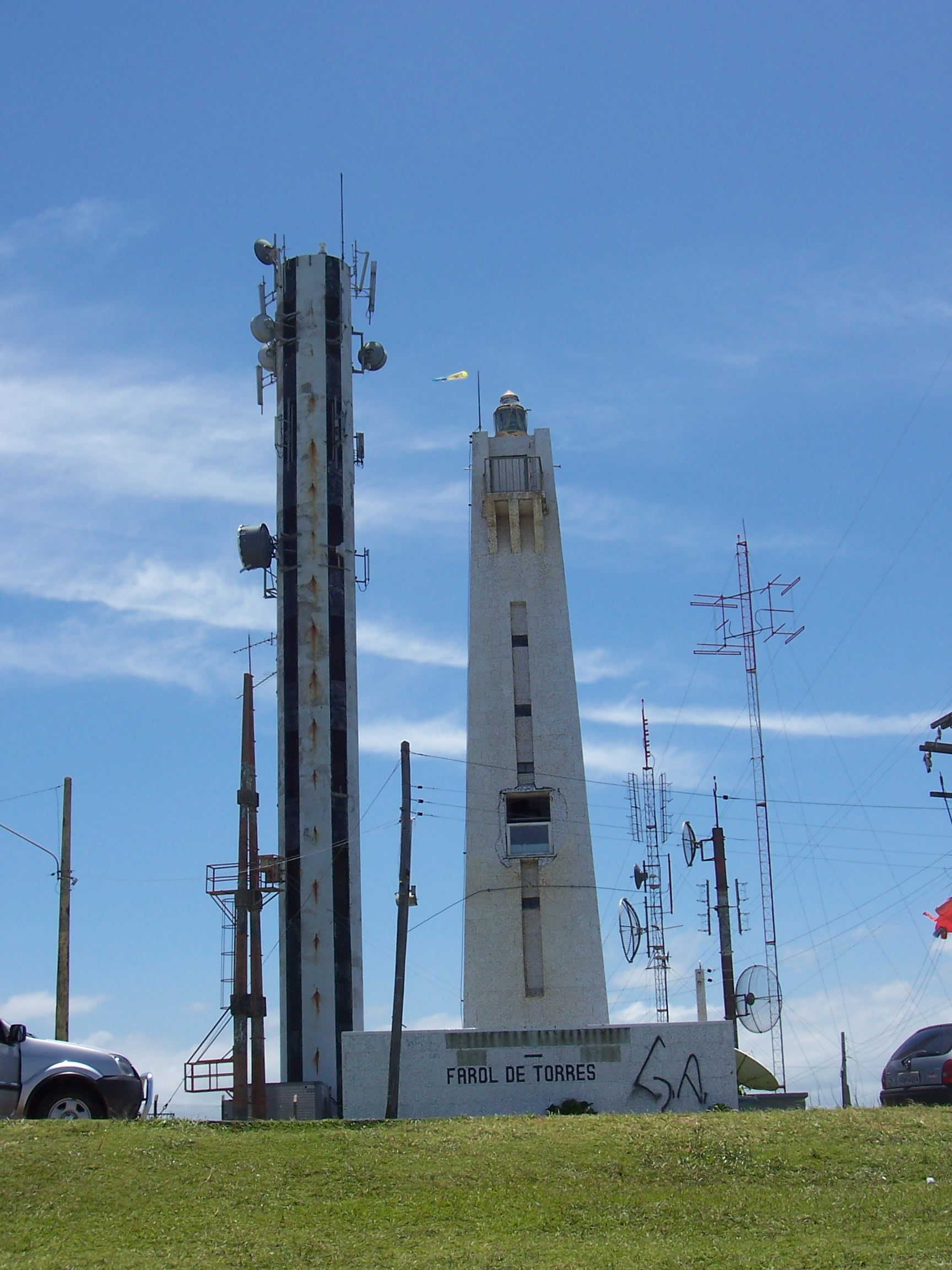 Farol de Torres, Rio Grande do Sul, Brasil.